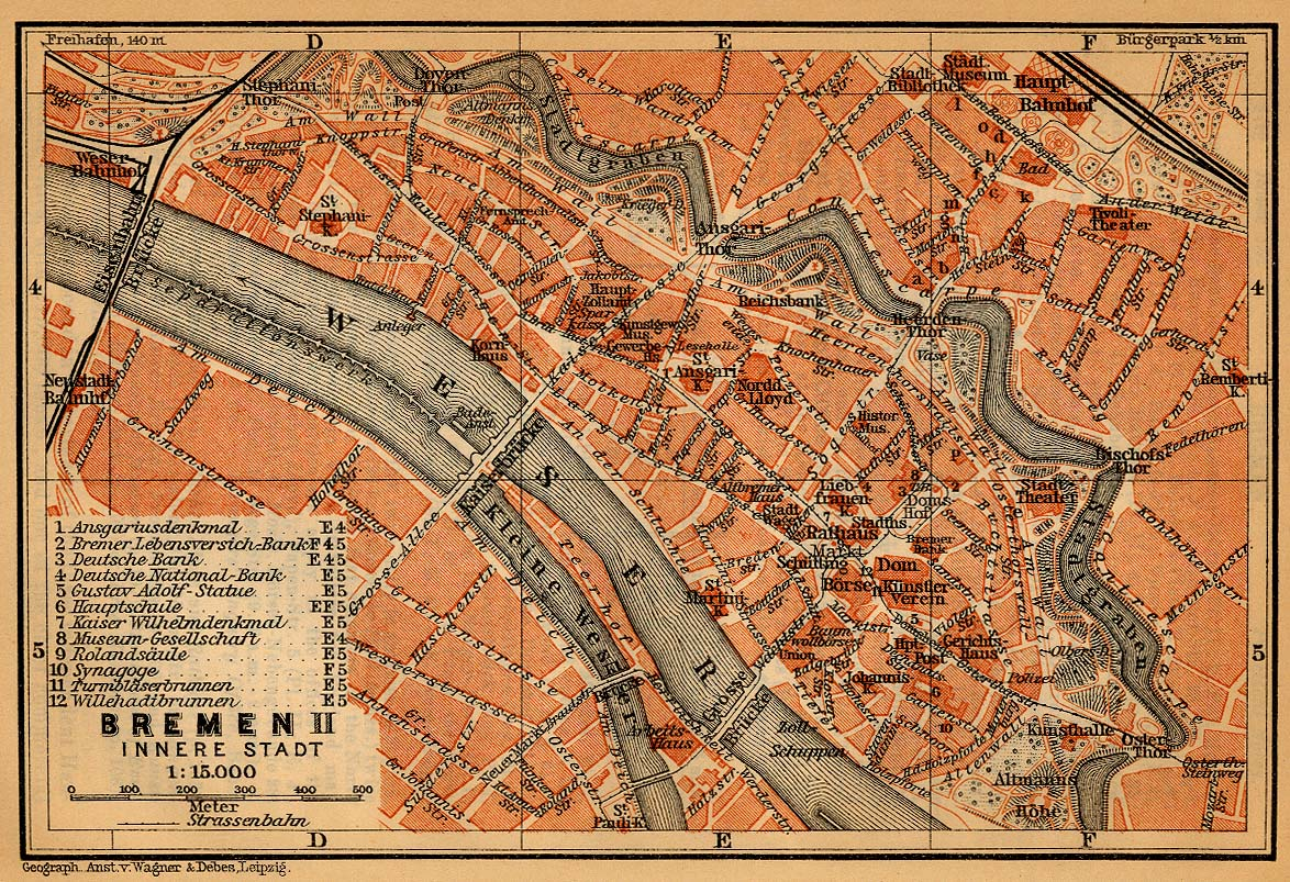 Bremen Inner area Map, 1910